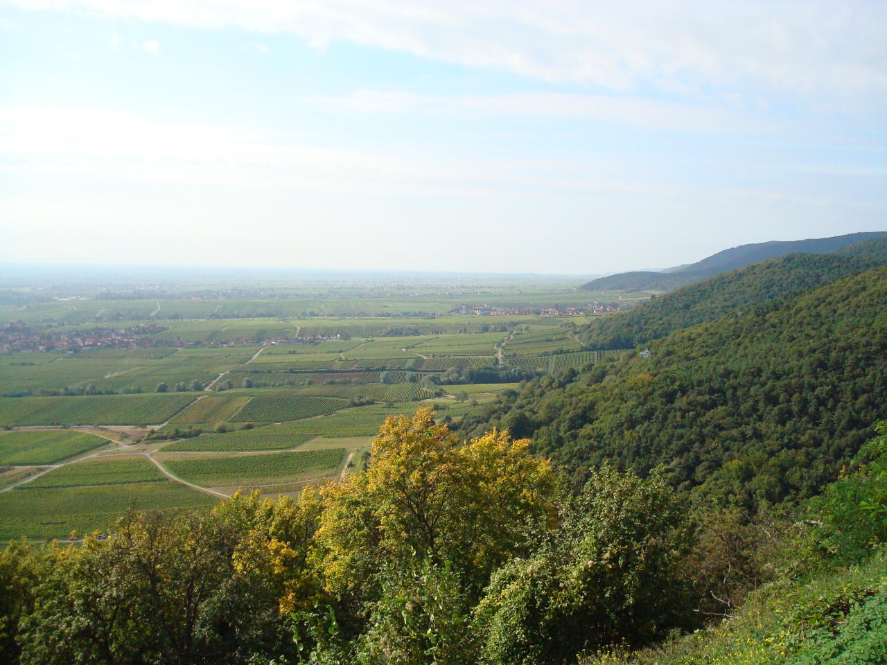 Blick vom Hambacher Schloss nach Süden